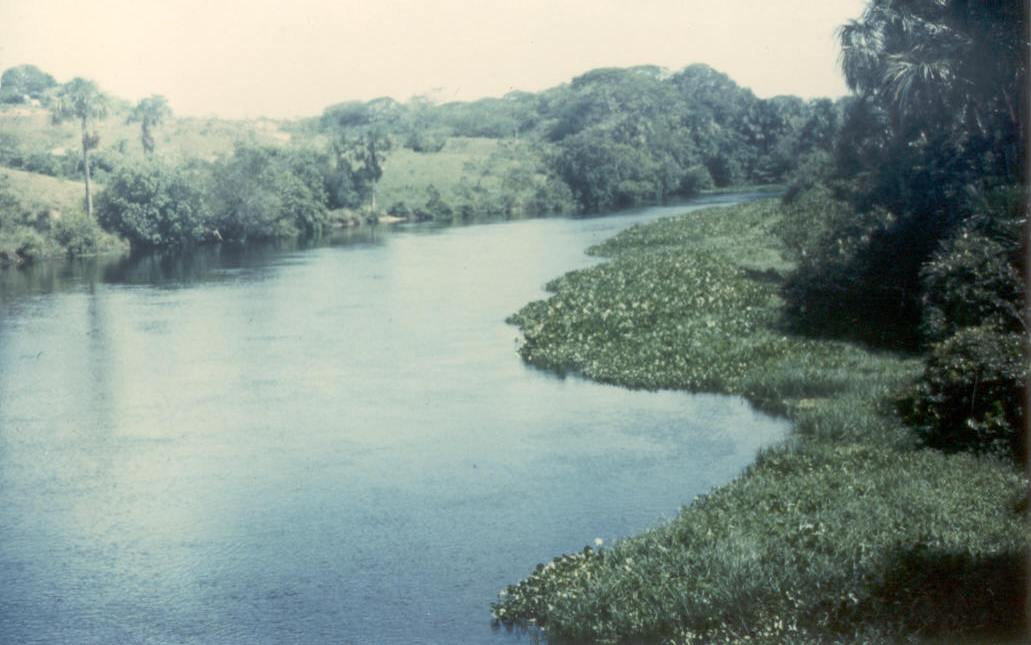 El río Yaracuy (Venezuela) desde el puente de la Carretera Panamericana, cerca de San Felipe. Puede observarse la vegetación acuática (lirios de agua o "bora") en la margen derecha. Foto: Fev. Fecha: febrero 1977.